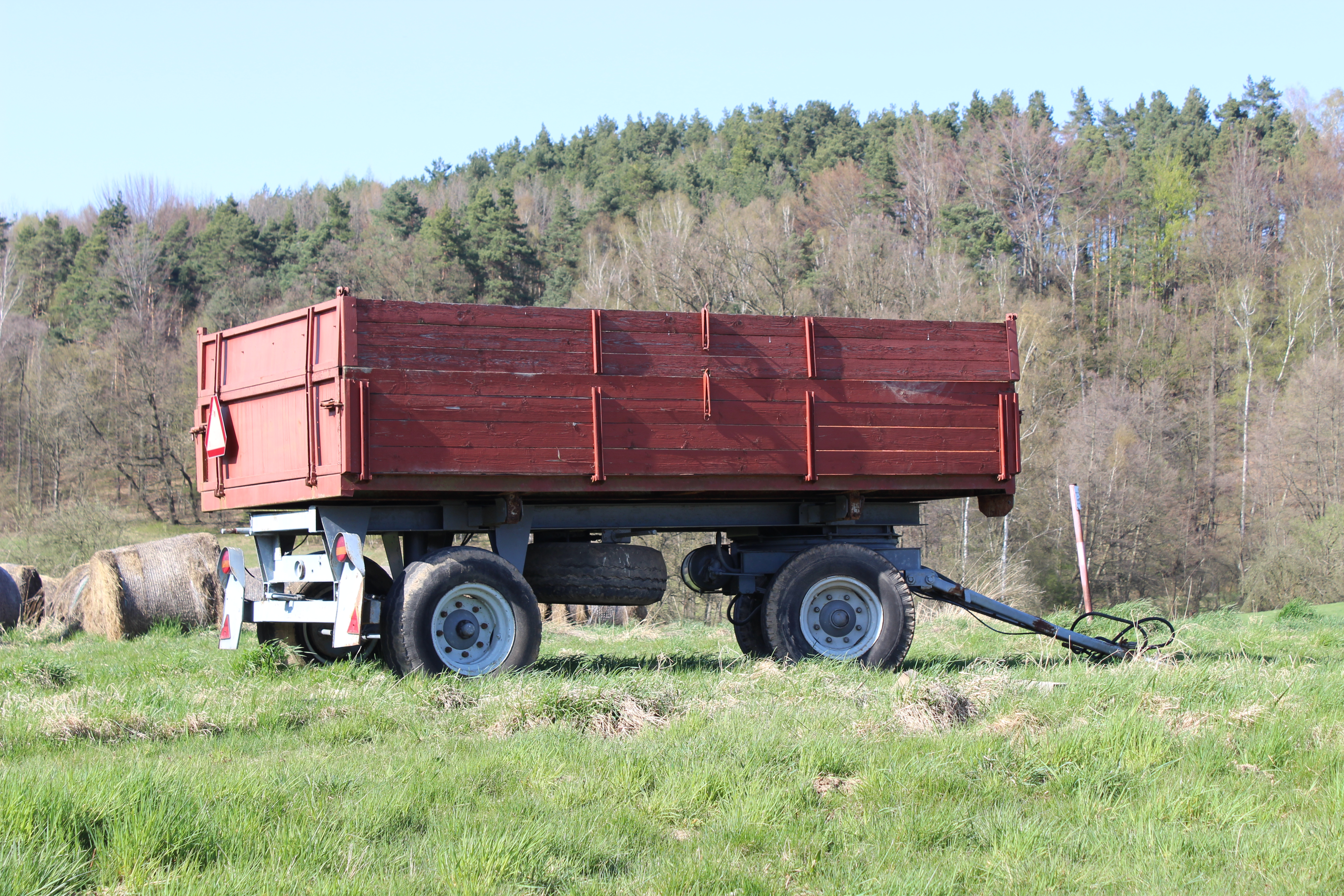 Přívěs za traktor stojící na louce u Hrachovic, části Mírové pod Kozákovem.